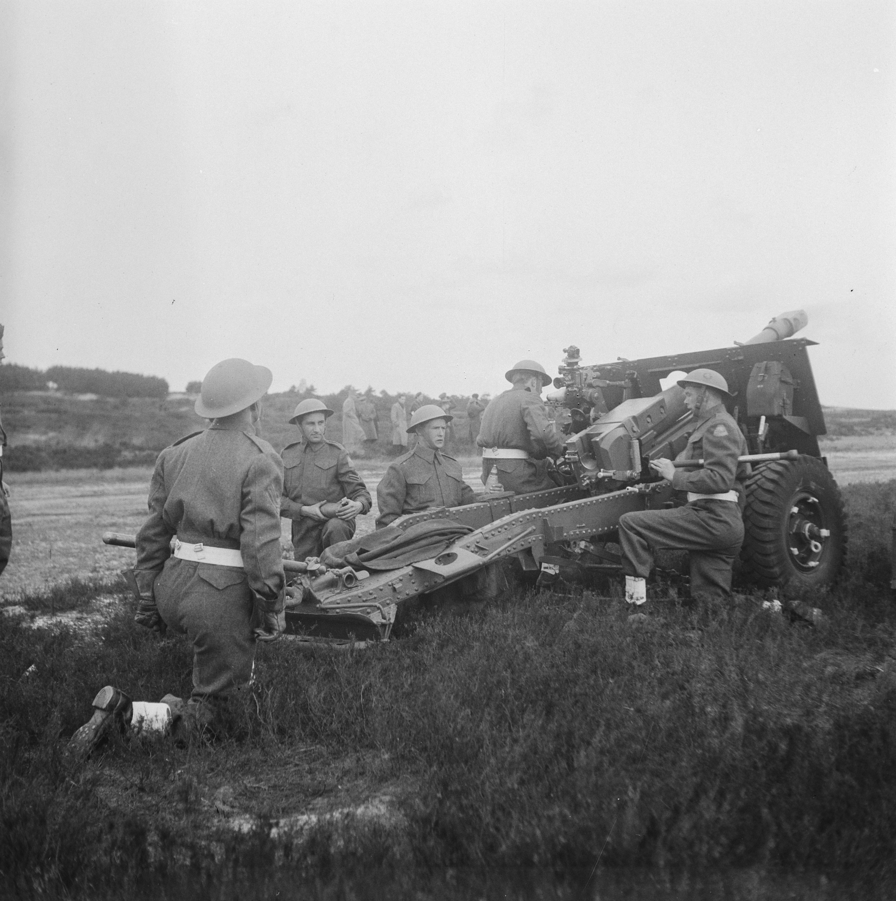 Collectie / Archief : Fotocollectie Anefo Reportage / Serie : [ onbekend ] Beschrijving : Schietoefeningen Oldebroek Datum : 12 april 1946 Locatie : Oldebroek Fotograaf : Breijer, Charles / Anefo Auteursrechthebbende : Nationaal Archief Materiaalsoort : Negatief (zwart/wit) Nummer archiefinventaris : bekijk toegang 2.24.01.03 Bestanddeelnummer : 901-6587